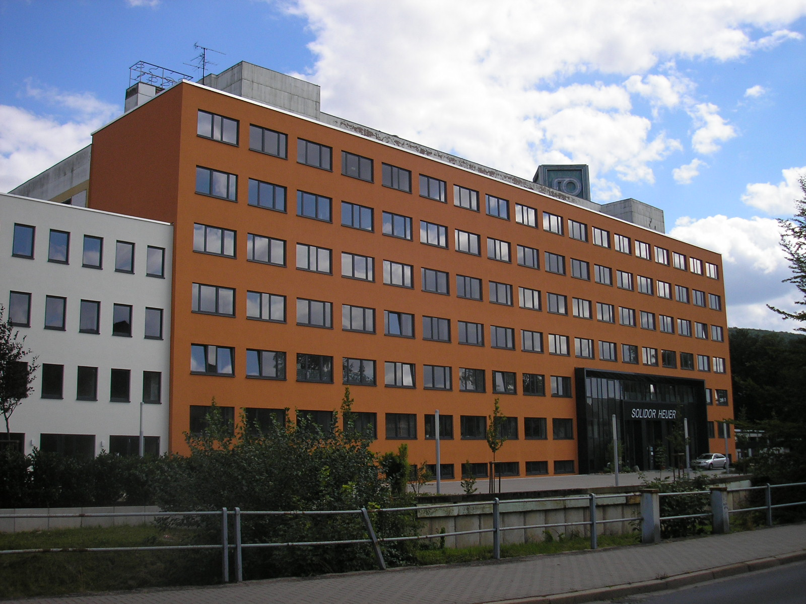 Ehemaliges Werksgebäude von solidor Heiligenstadt (Thüringen), nach 1990 Nachnutzung durch ein Unternehmen.